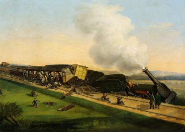 Eisenbahnunfall von Jerxheim, Öl auf Blech